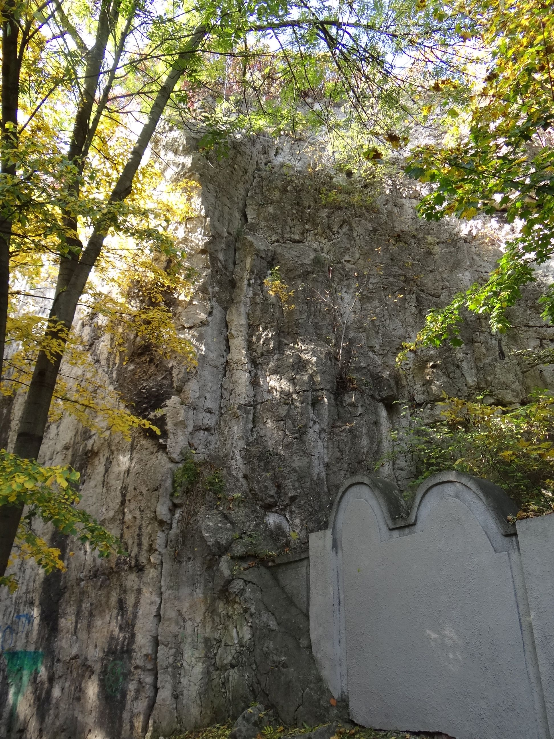 Mur skalny "Esteci" w dawnym kamieniołomie pod św. Benedyktem na Krzemionkach Podgórskich w Krakowie